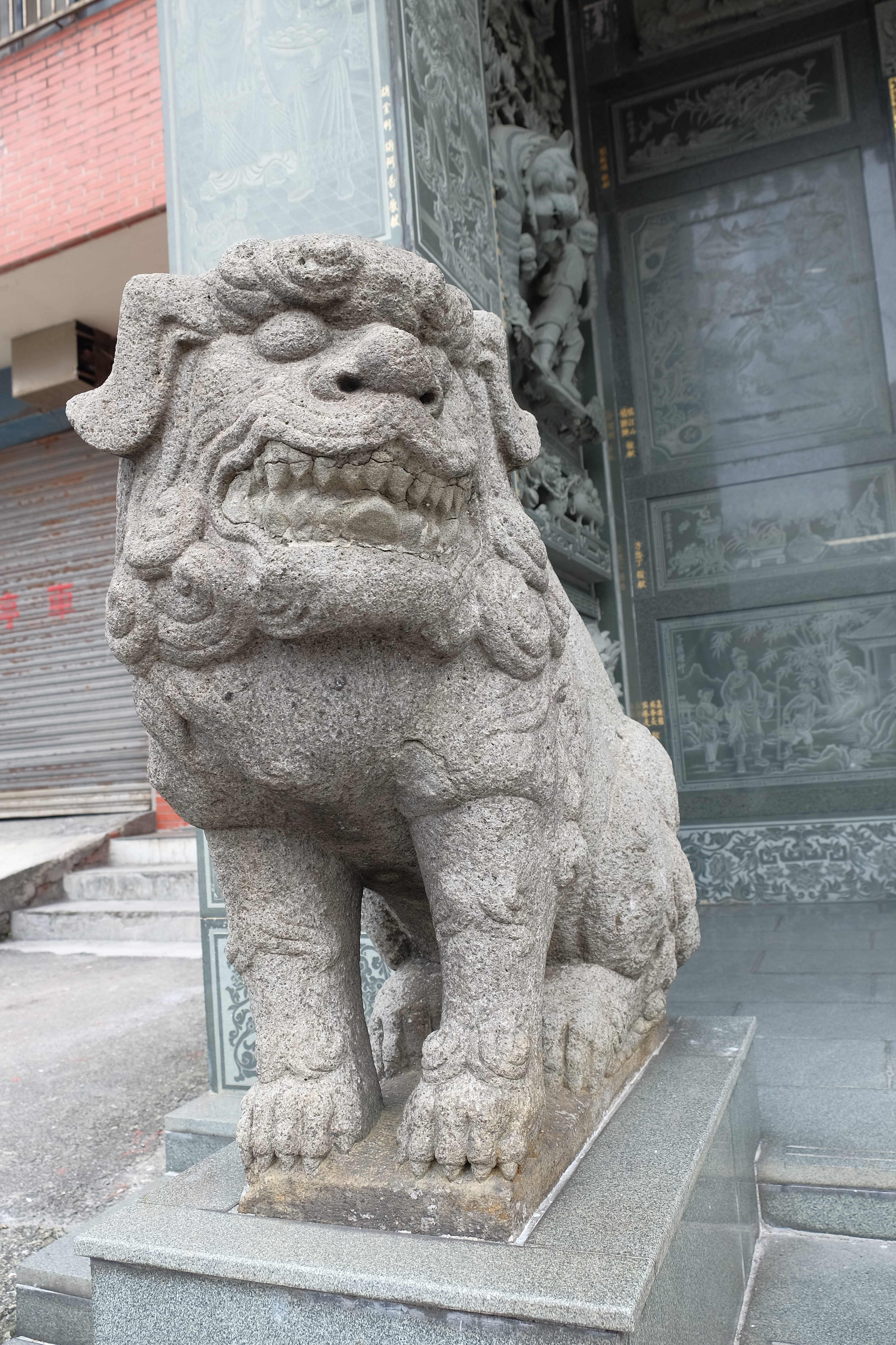 中文（台灣）: 2018 Ruifang Shrine Komainu吽形 瑞芳龍巖宮前